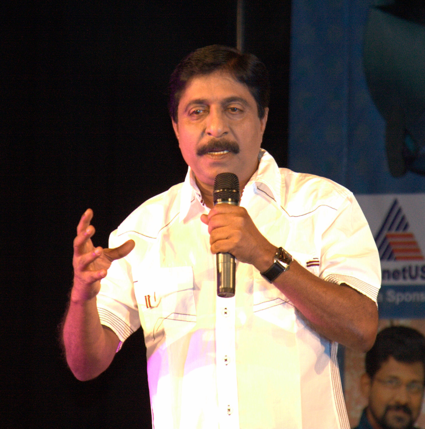 ശ്രീനിവാസൻ - ശ്രീനിയാൻ 20 20 എന്ന സ്റ്റേജ് ഷോ അവതരിപ്പിക്കുന്നു